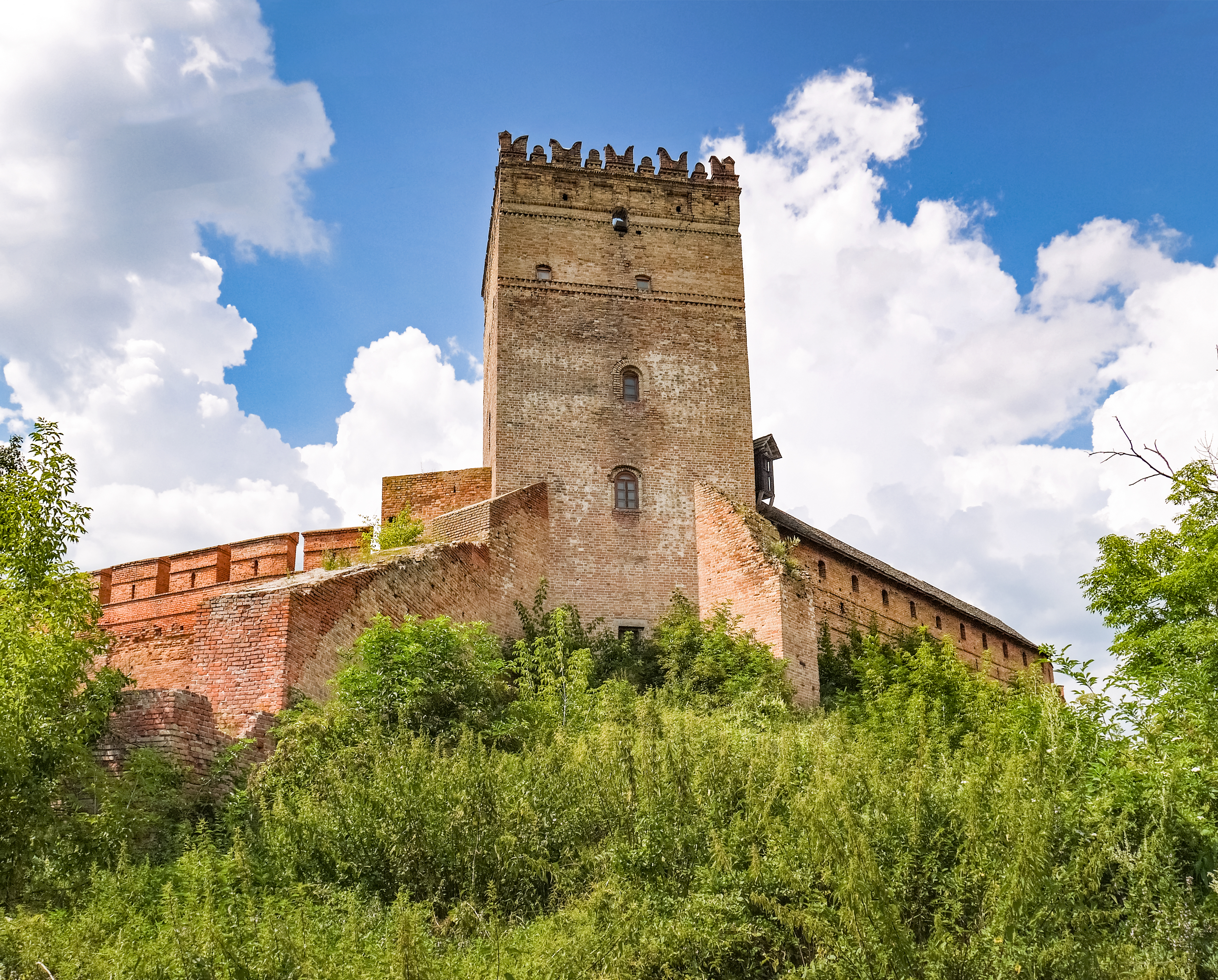 Башта Стирова (Свидригайла), Луцьк, вул. Кафедральна, 1а